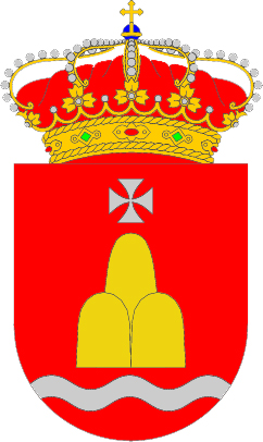 Escudo del Municipio burgalés de Villafranca Montes de Oca